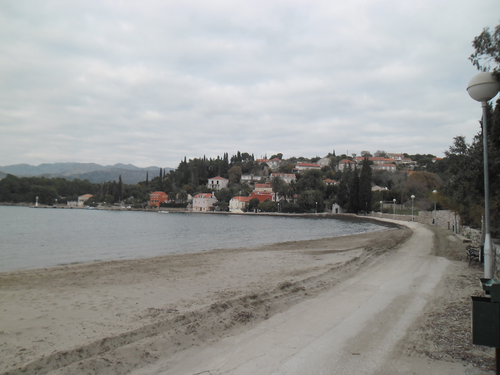 Donje Čelo, Koločep